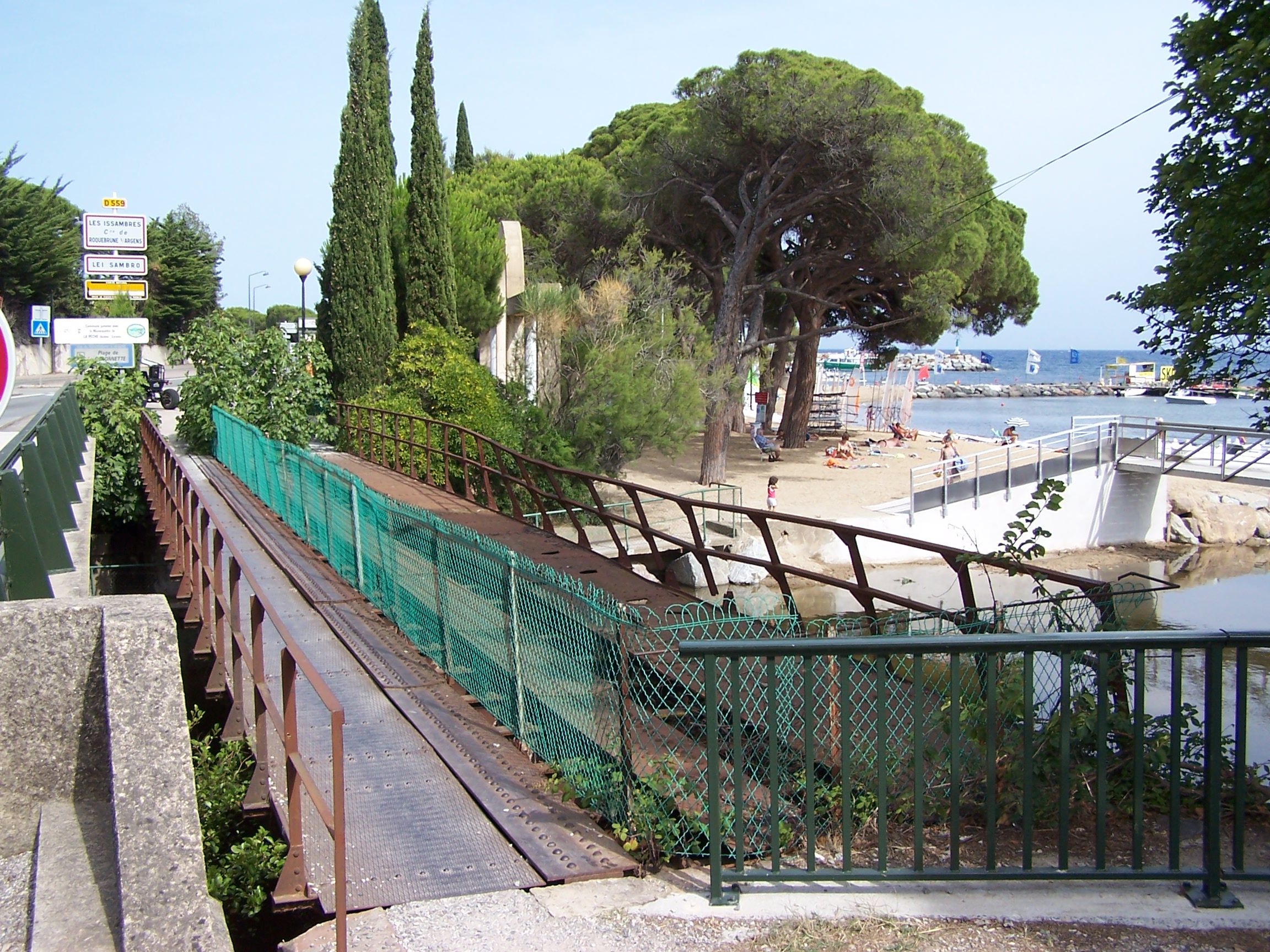 Brücke der ehemaligen Kleinbahn "Ligne du Littoral varois" in Les Issambres.